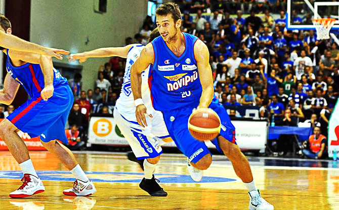 Giancarlo Ferrero, il 9 ottobre 2011, a Sassari con la maglia della Junior Casale. Fu la sua prima presenza in Serie A, con 8 punti a referto.